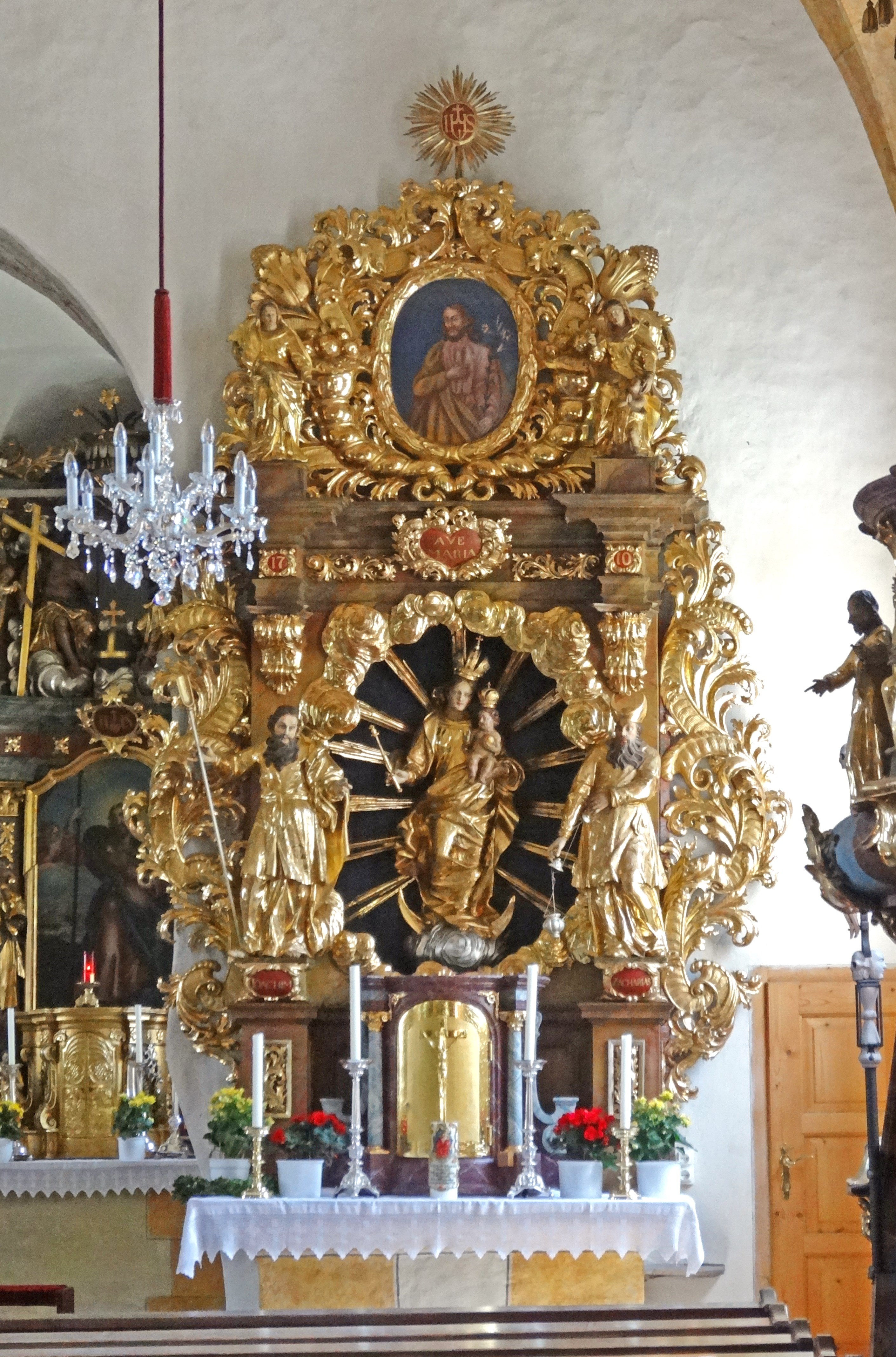 Kath. Pfarrkirche hl. Jakobus d. Ä. (Tiffen), rechter Seitenaltar